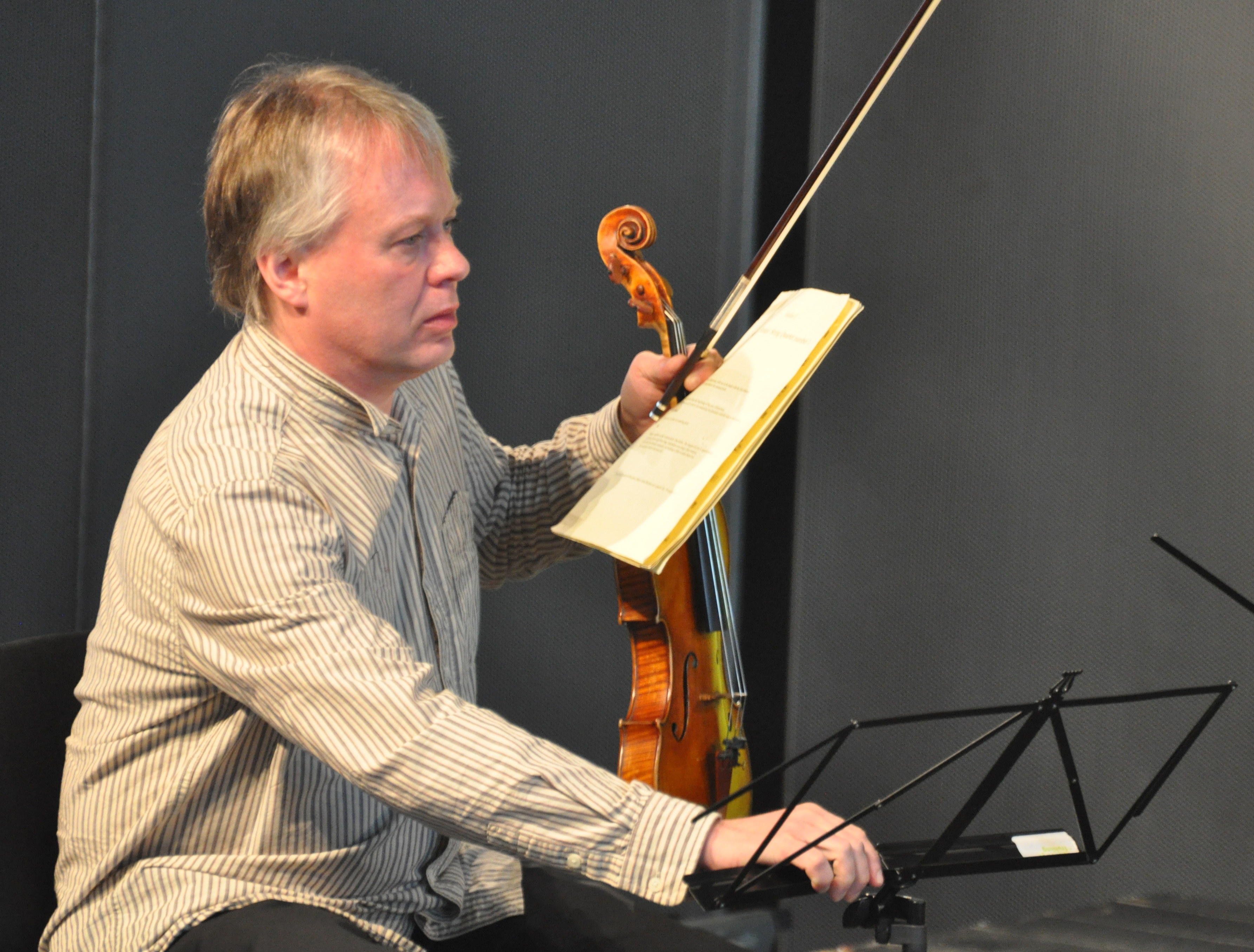 Engegård Quartet beim Heidelberger Streichquartettfest des Heidelberger Frühlings, 25. Januar 2013. Arvid Engegård, Violine